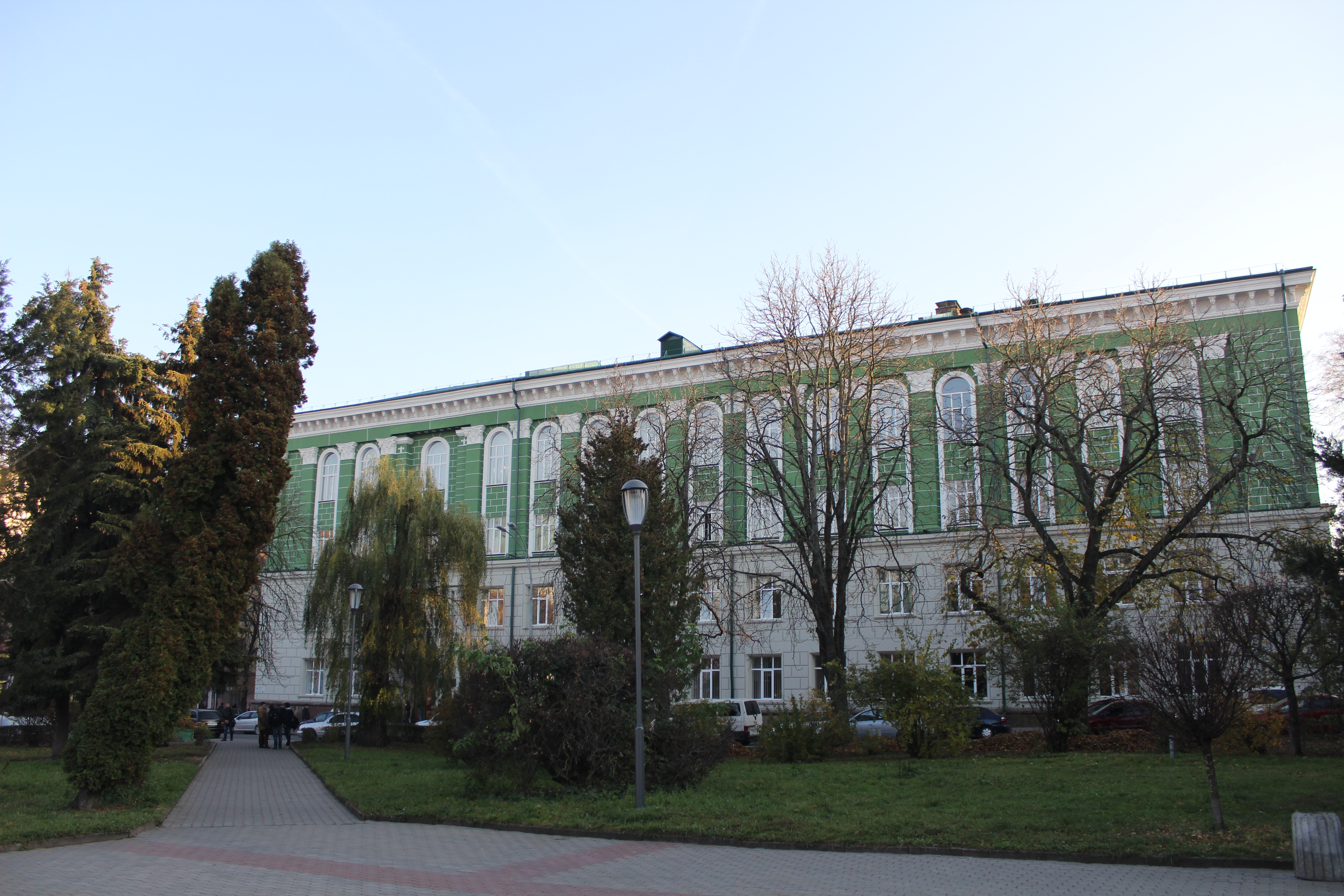 Адмінкорпус медичного університету (мур.), Тернопіль, майдан Волі, 1